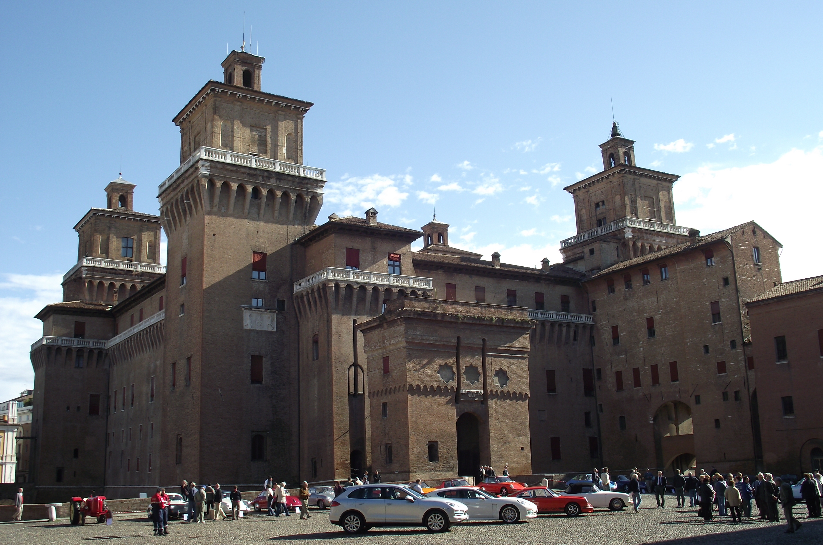 Castello Estense durante la manifestazione "autostoriche in CentroStorico" 2010 This is a photo of a monument which is part of cultural heritage of Italy.